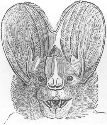 Bat face, Megaderma lyra